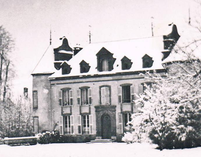 Chateau des Gains sous la neige